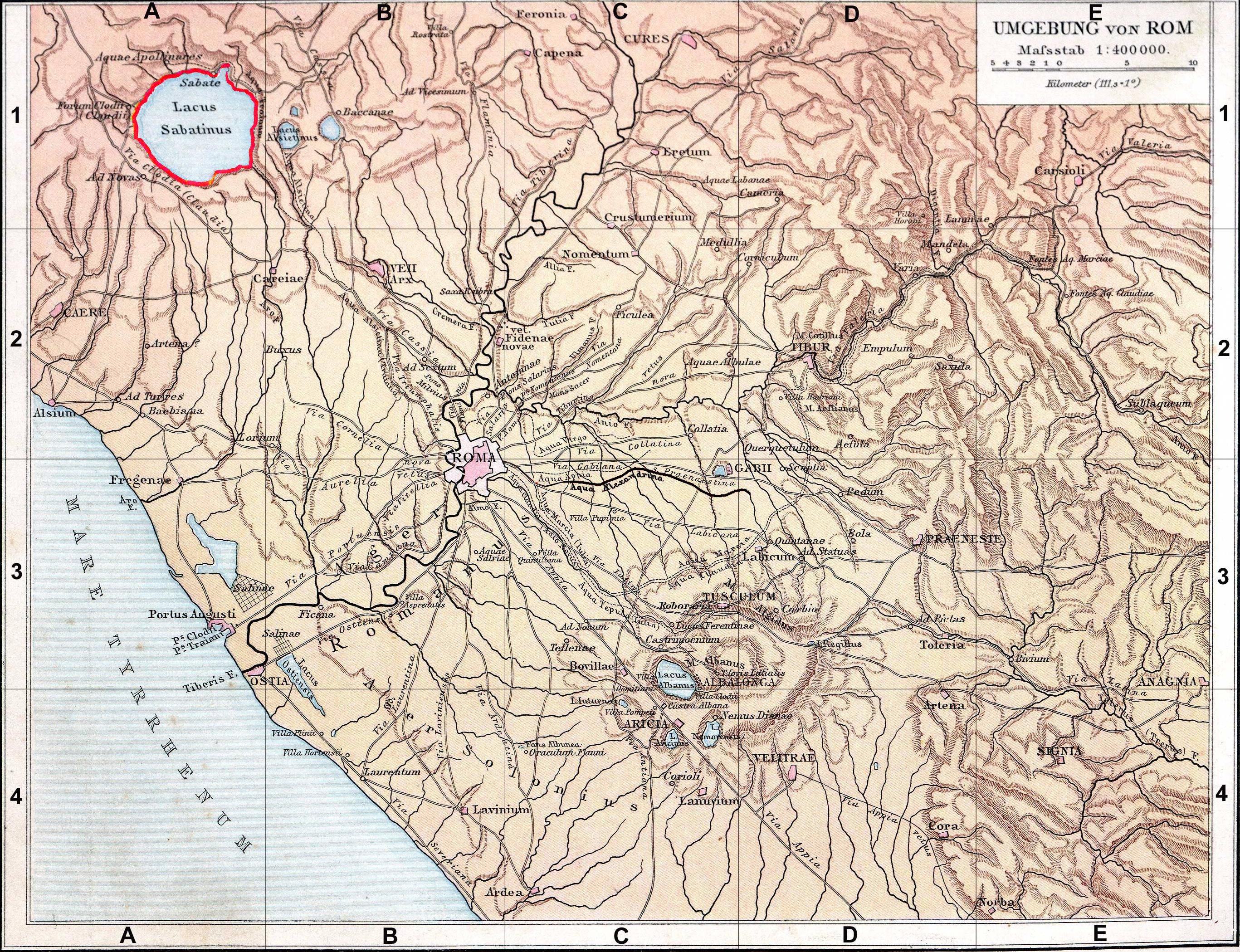 Fond de carte de 1886 (G. Droysens Allgemeiner Historischer Handatlas), libre de droit (Image:Rom_Umgebung.jpg), Lago di Bracciano en rouge.